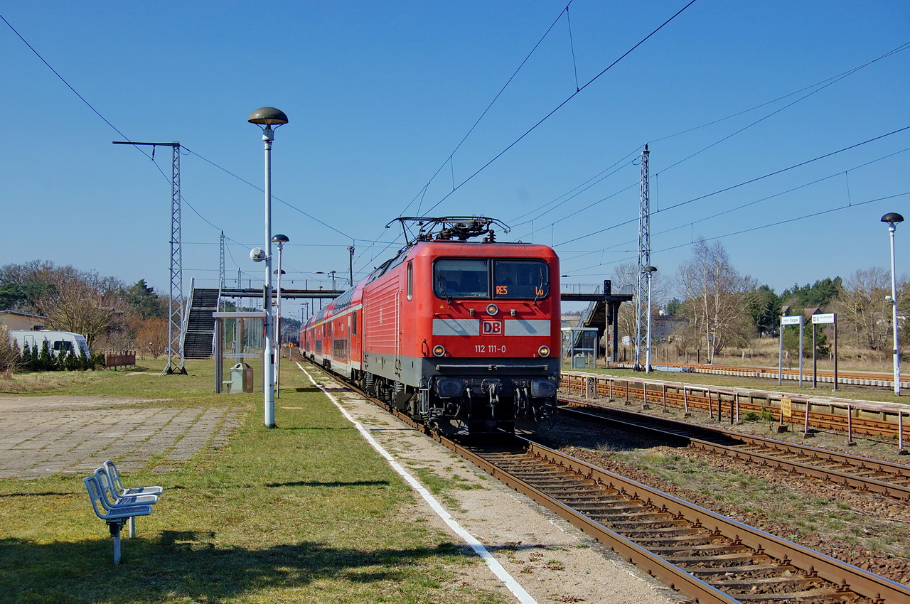 DB 112 111 mit Zug der Linie RE5 von Rostock nach Lutherstadt Wittenberg im seit September 2011 nicht mehr bedienten Bahnhof Kargow